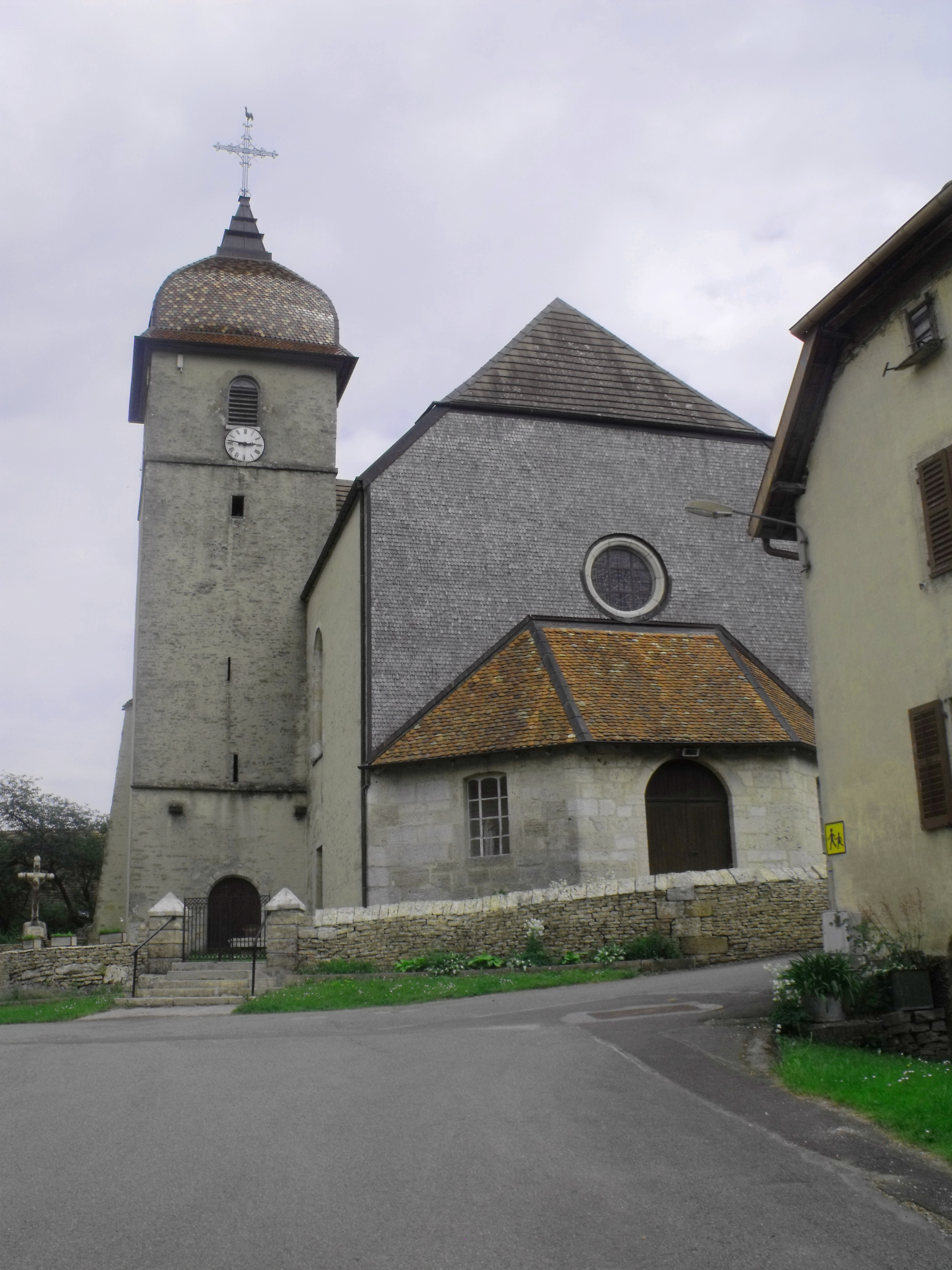 Eglise de Dambelin, Doubs, France